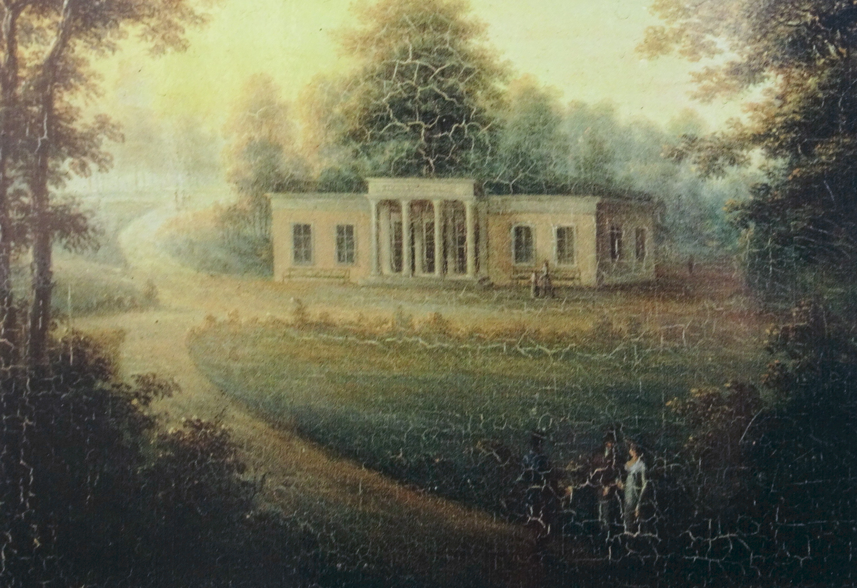 Drottningens paviljong, målning av Janette Åkerman